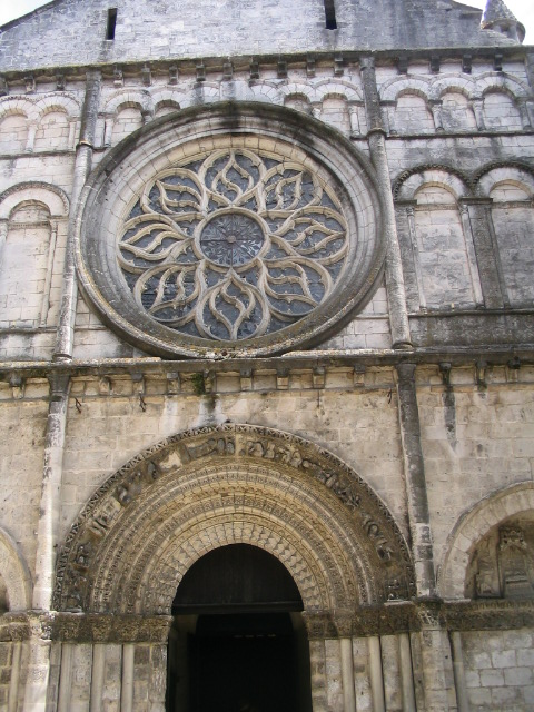 Photo prise par moi le 29 juillet 2006 à 14h35 à Cognac